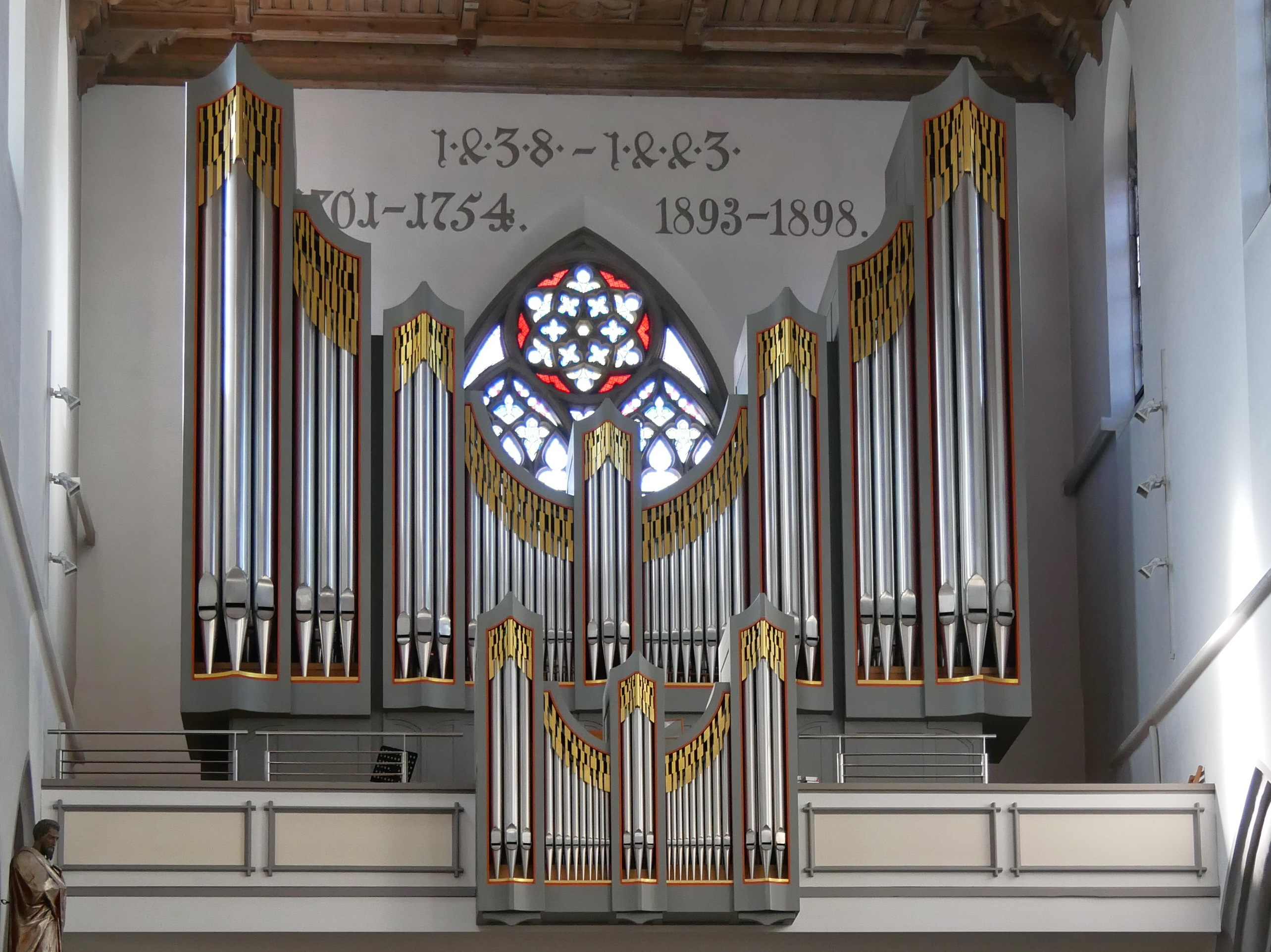 Kaufbeuren, Kath. Stadtpfarrkirche St. Martin: Empore